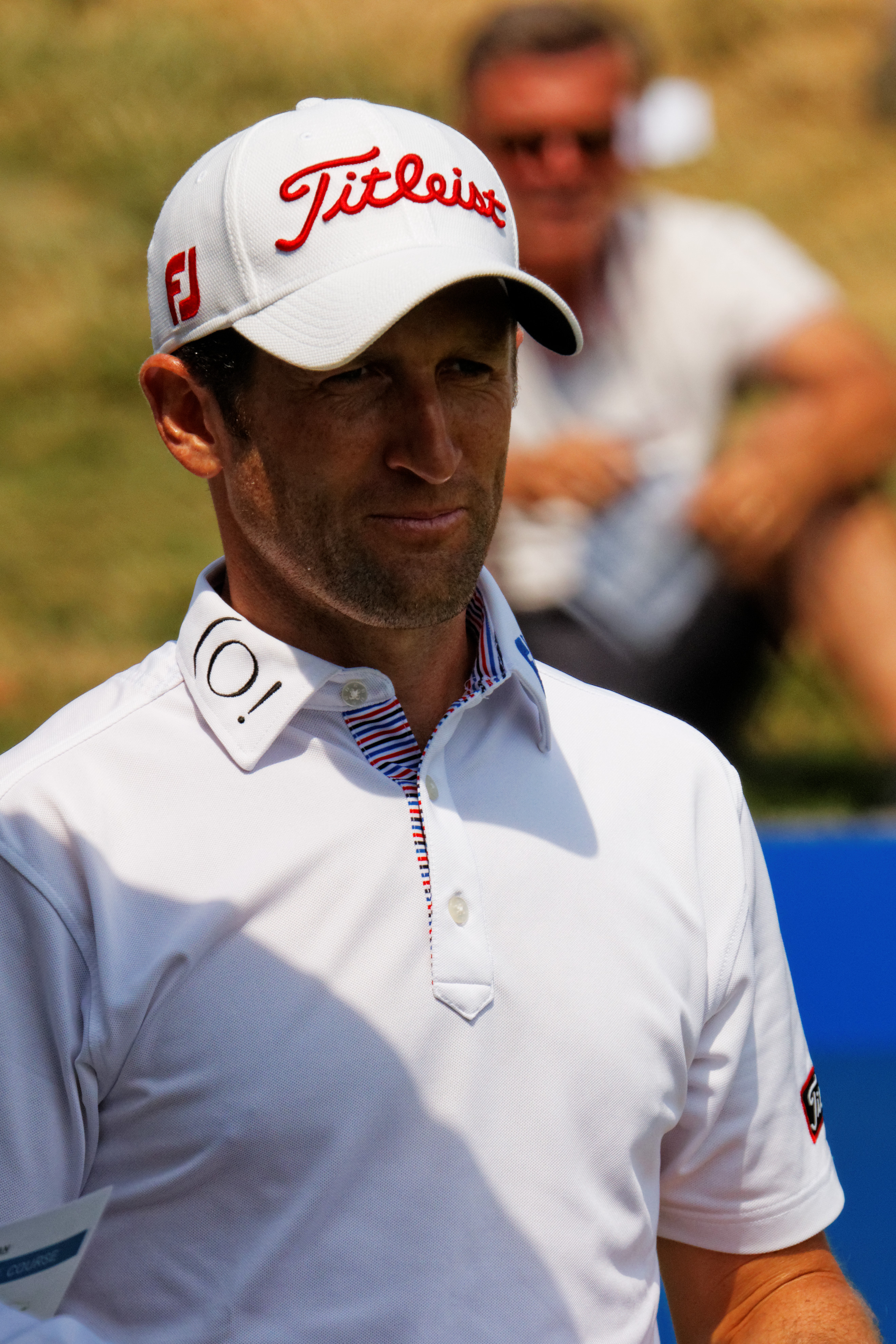 Photo prise lors de l'Alstom - Open de France 2015 à St Quentin en Yvelines